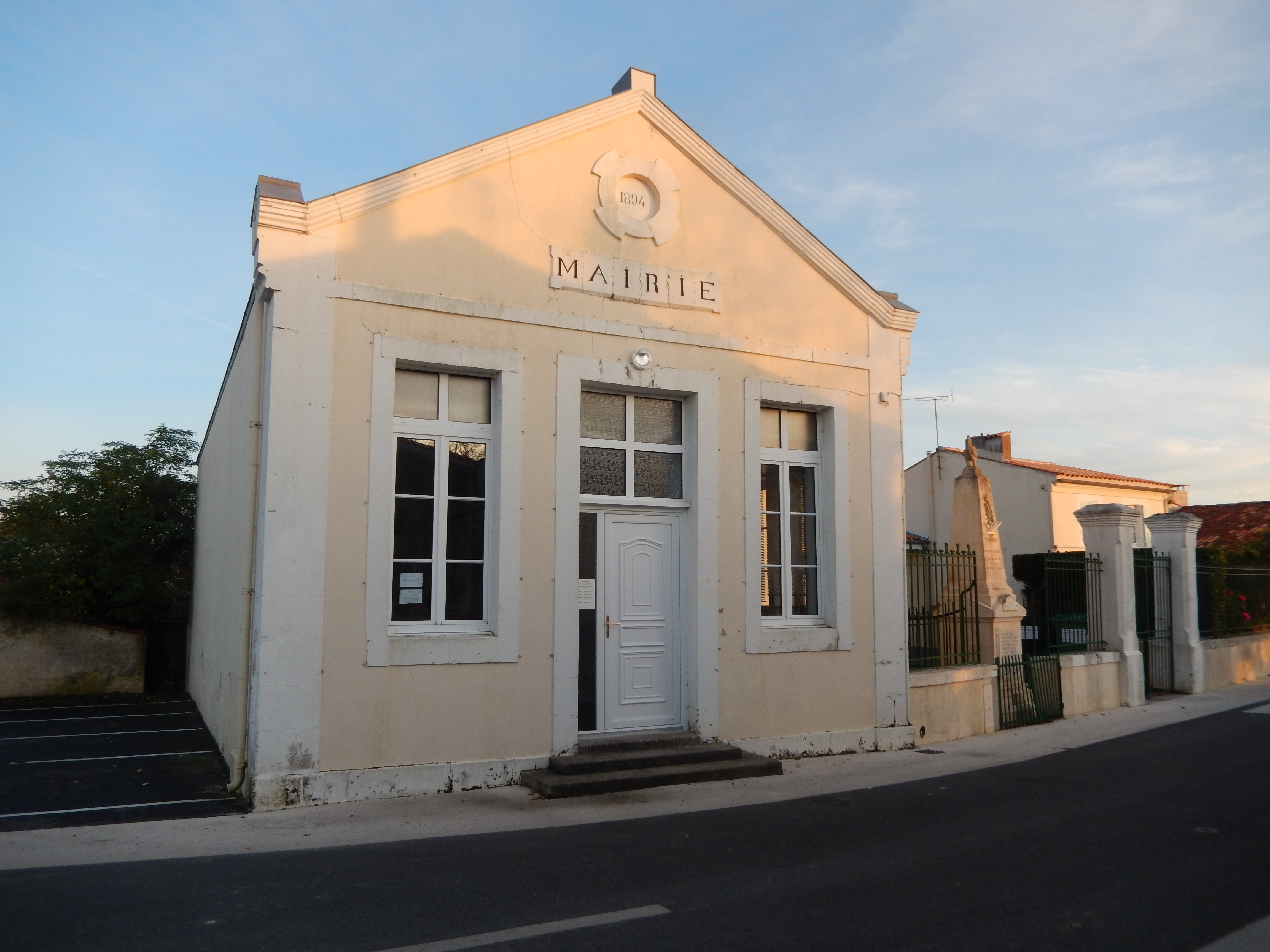 Puy-du-Lac, Charente-Maritime, France. Ceci est la mairie de Puy-du-Lac, située au lieu-dit La Jarrie.